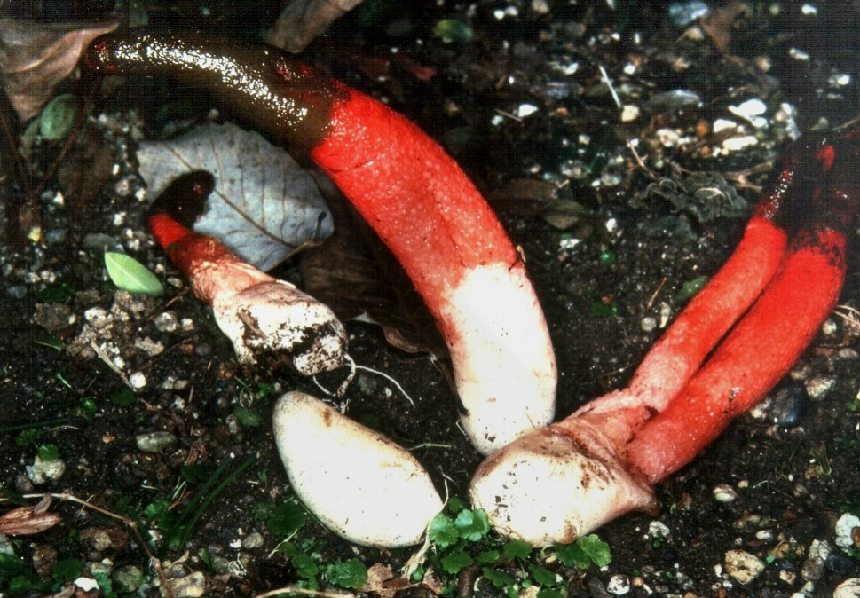 Champignon gastéromycète. Photo des specimens (type) de la première récolte japonaise. Nom latin : Mutinus elegans (Montagne) Ed. Fischer (1888), in Saccardo, Sylloge Fungorum 7 (1) :13 Nom français : Satyre élégant Nom scientifique japonais : Tanuki-no-beni-efude (タヌキノベニエフデ, 狸紅絵筆), Guez D. et Nagasawa E. (2000), Trans. mycol. Soc. Japan 41 p.75-78